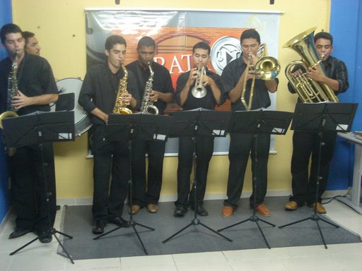 kiriri jazz band